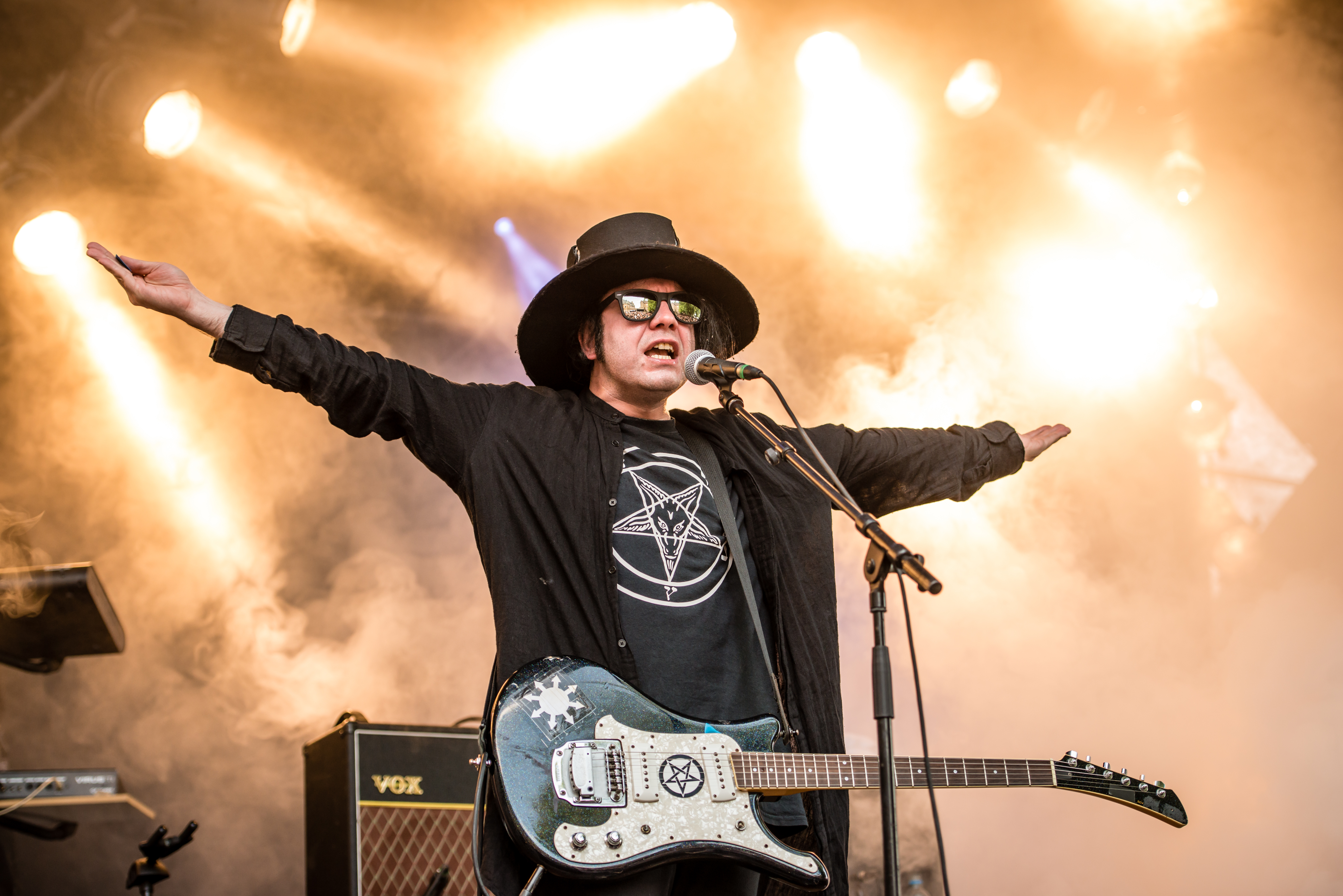 'Castle Rock 2015; Mülheim Schloß Broich': 'Whispers in the Shadow'